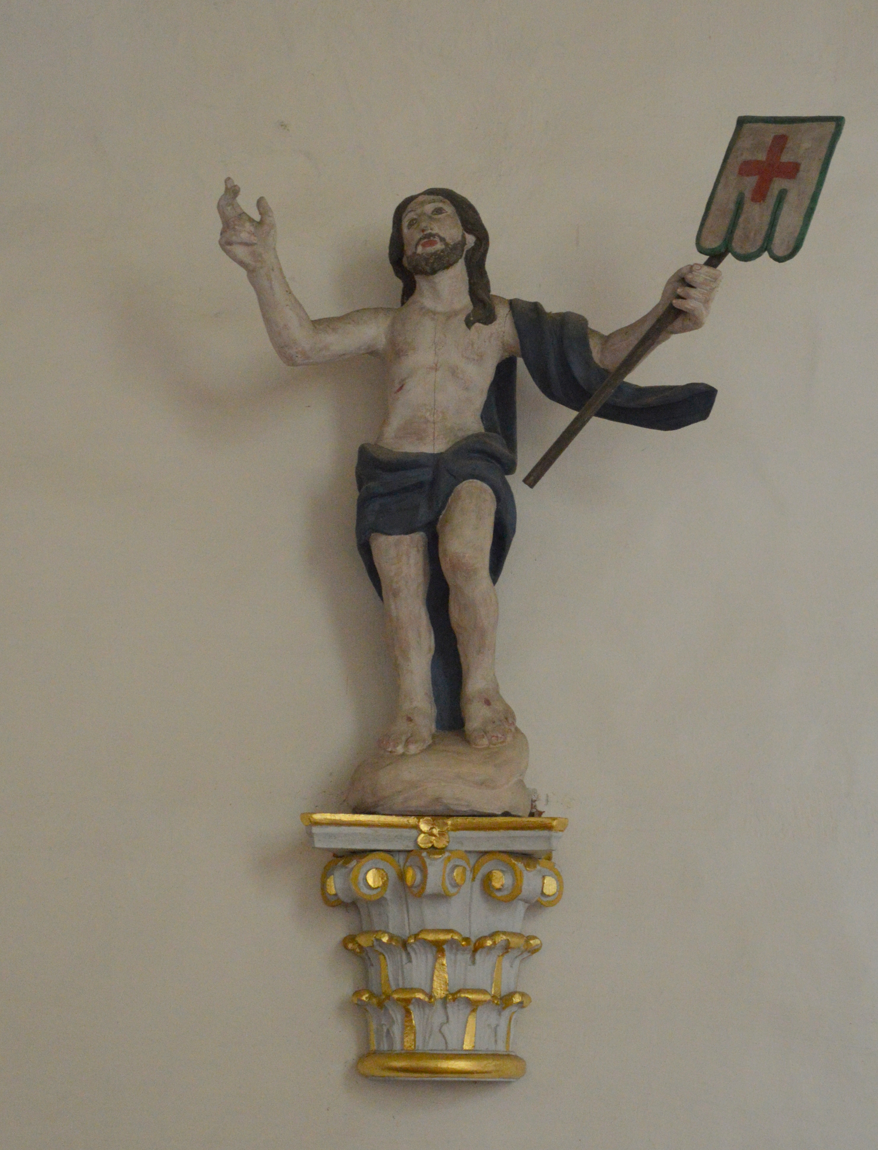 Kirche Plötzky Figur